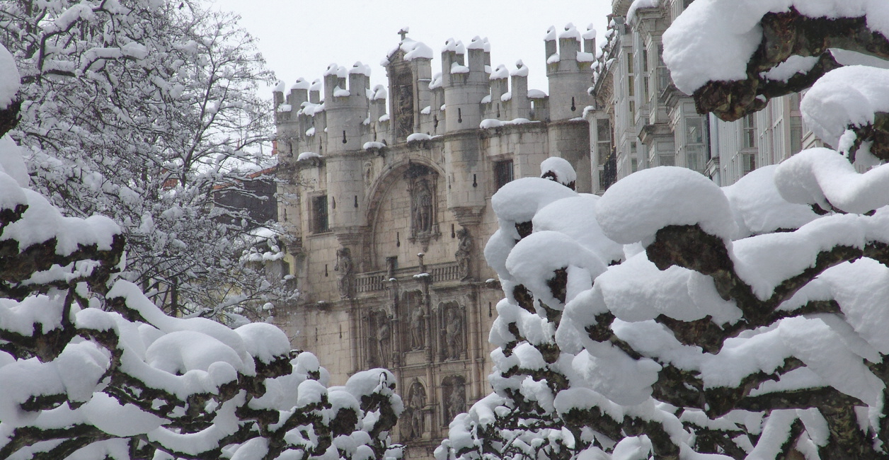 Arco de Santa María desde el paseo del Espolón, nevada 2007, Burgos, España.